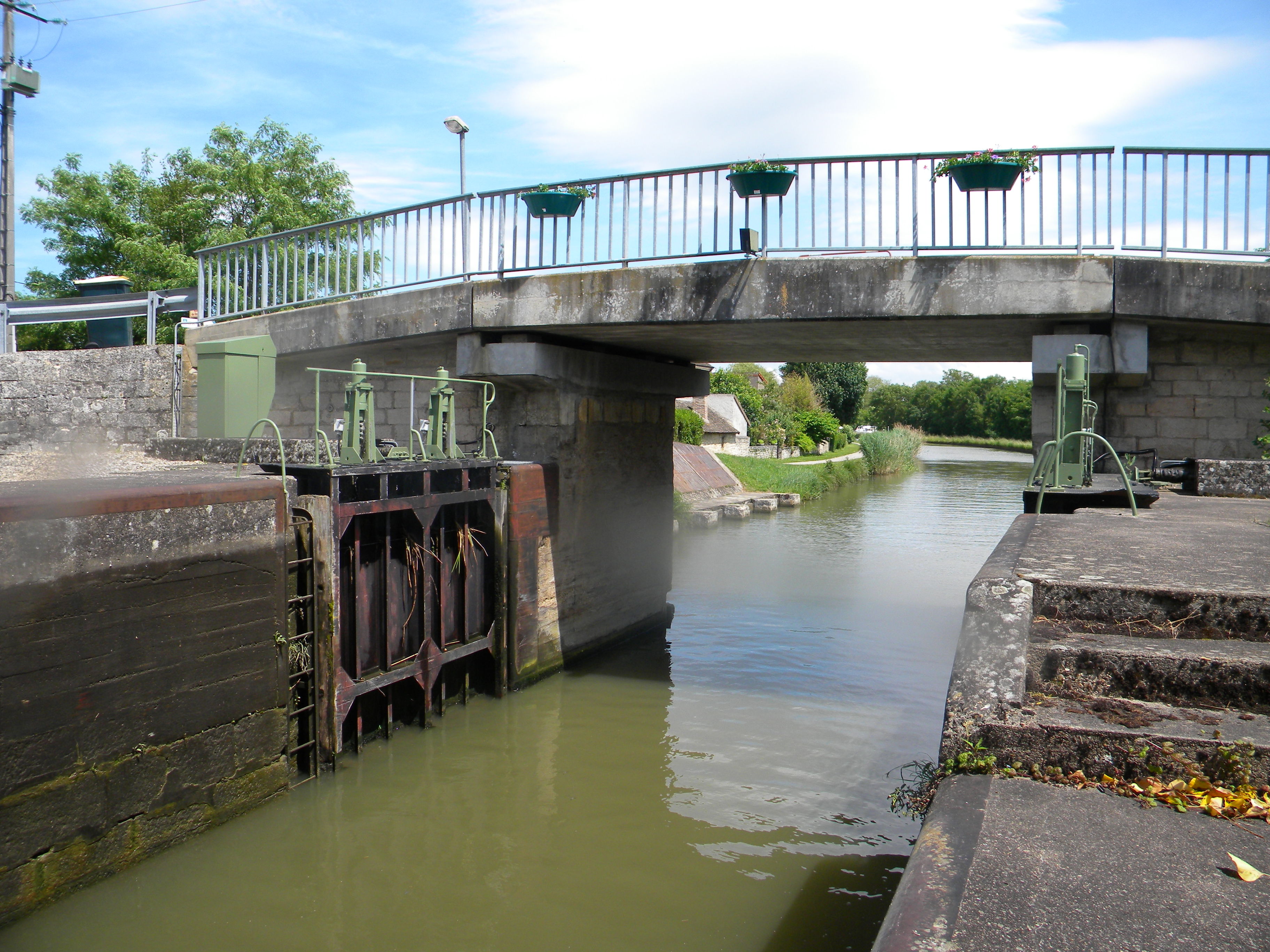 Kluzo en Centra Kanalo